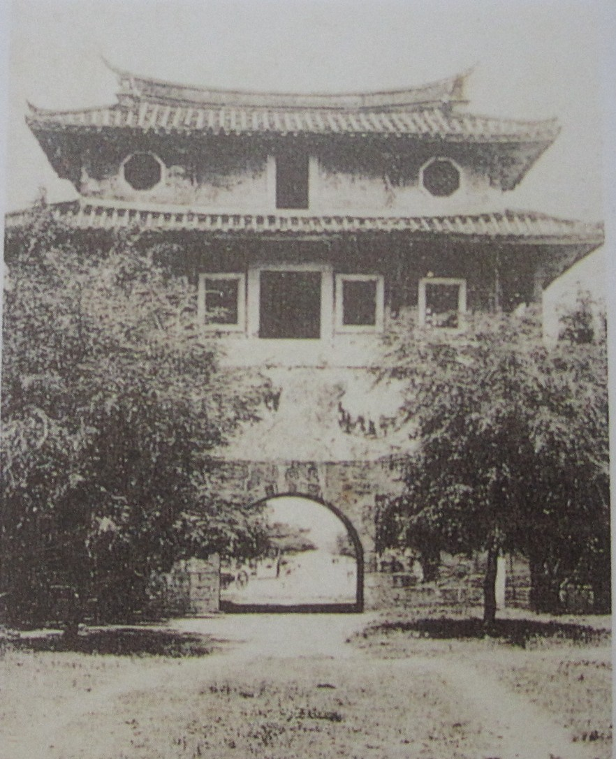 1936年的臺灣府城大東門